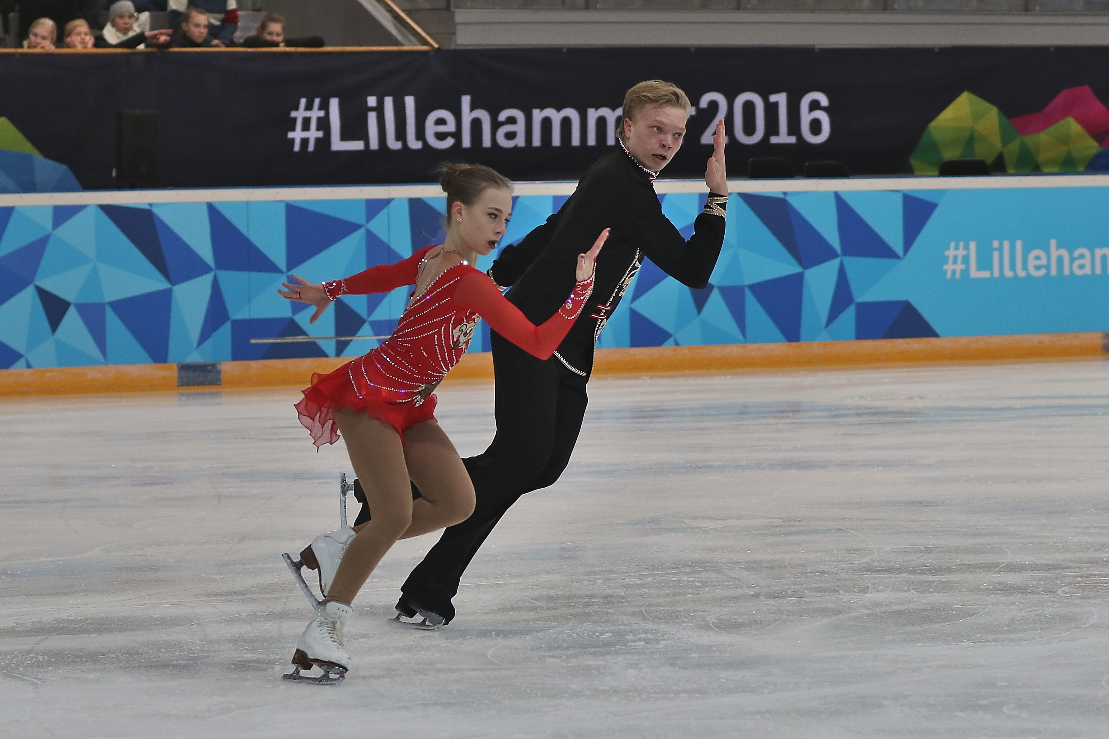 Lillehammer 2016 - Figure skating - Ekaterina Borisova and Dmitry Sopot